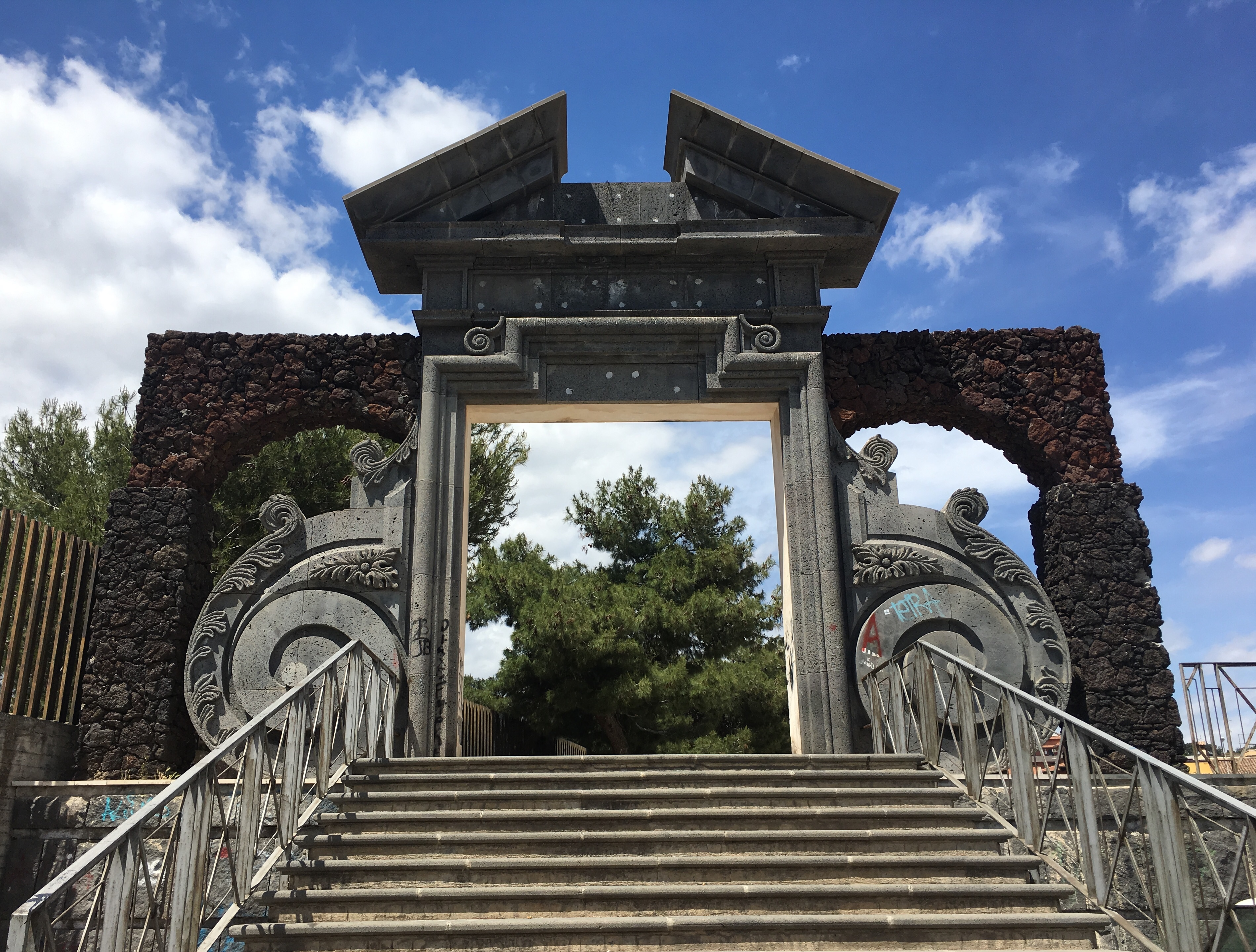 Arco di piazza de I Viceré a Catania